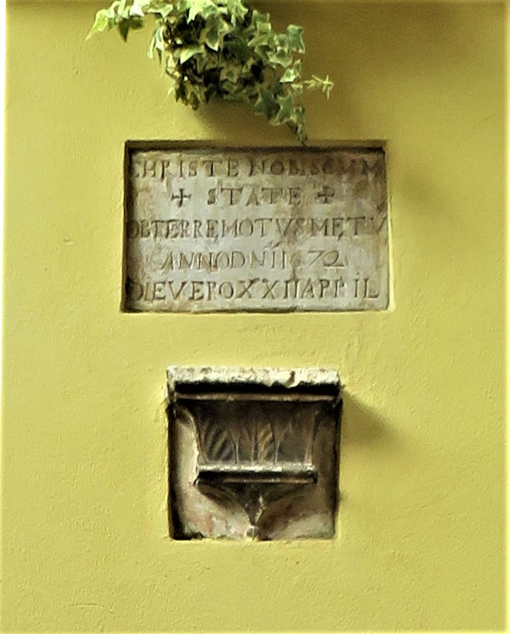 Casa in via Capo delle Volte, a Ferrara. Particolare. Testo epigrafe: CHRISTE NOBISCVM+ STATE +OB TERREMOTVS METVANNO D[OMI]NI 1672DIE VERO XXII APRIL[IS]